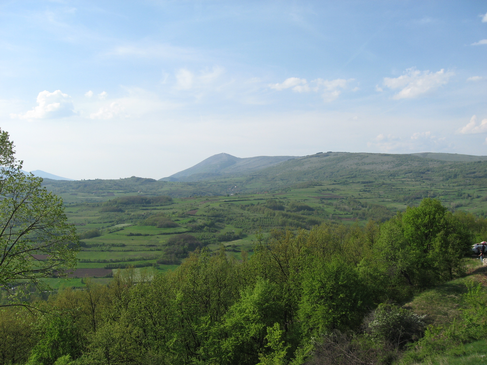 Поглед на Шљивовички Вис и део општине Бабушница. Драган Цветковић.